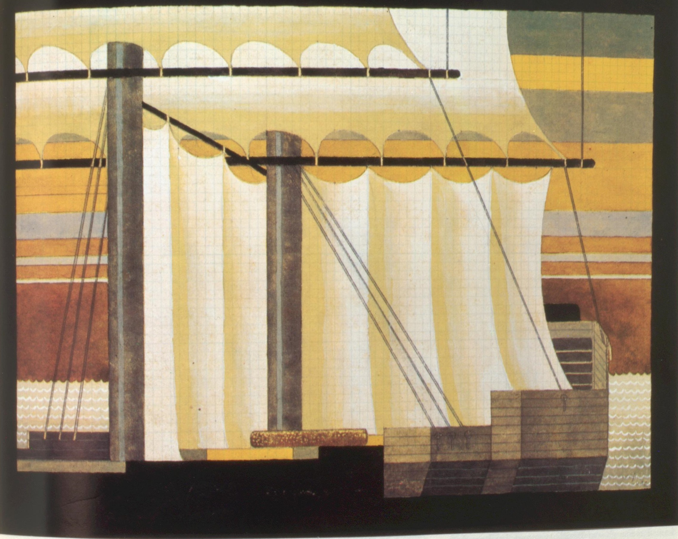 Ewald Dülberg Bühnenbildentwurf zu Tristan und Isolde Krolloper 1931